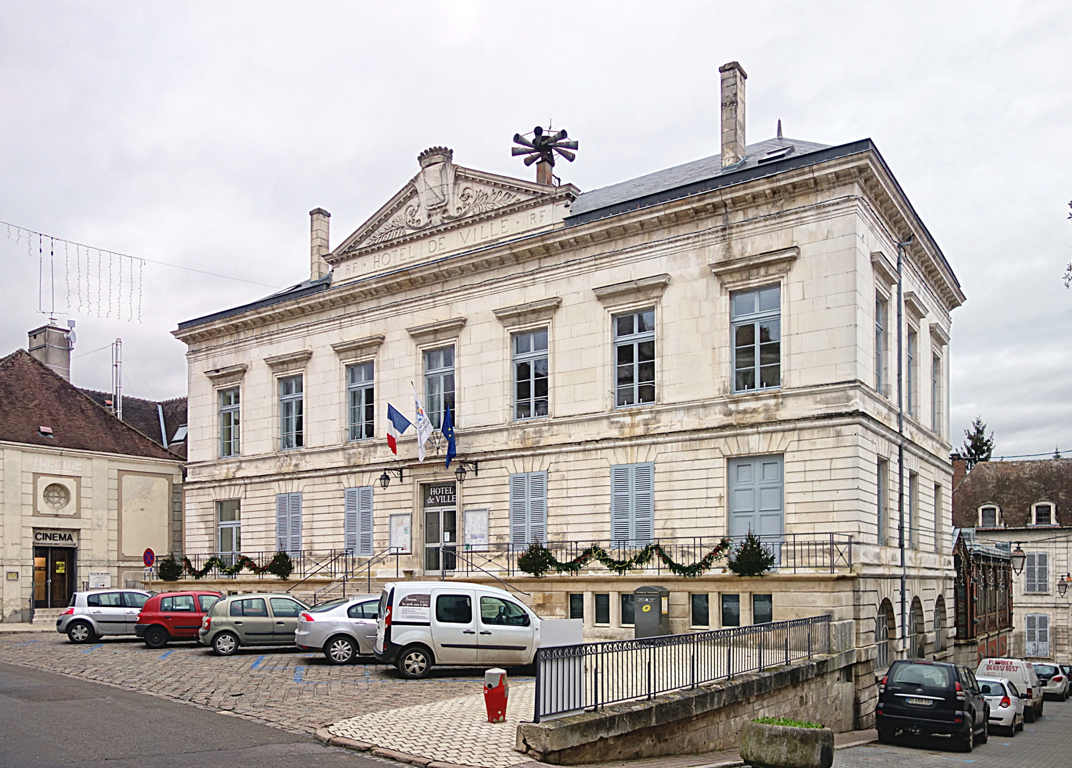 L'hôtel de ville de Tonnerre.